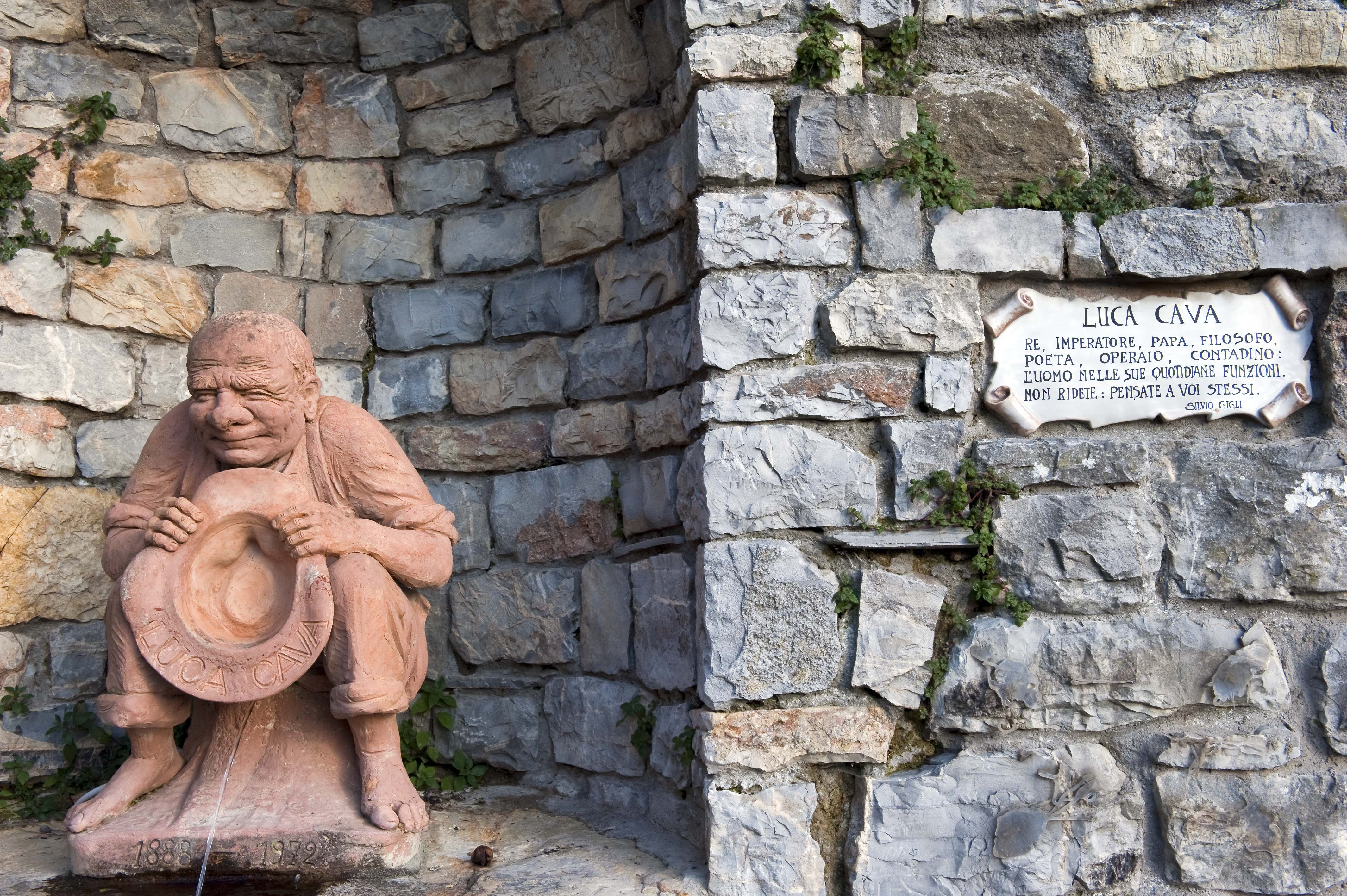 Statua di Luca Cava - San Gusmè - Siena